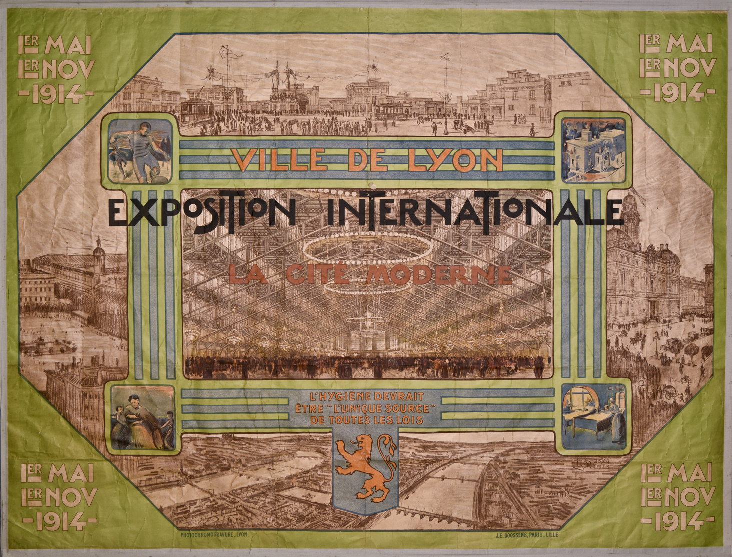 Affiche de l'Exposition internationale, La cité moderne par Tony Garnier - Bibliothèque municipale de Lyon, mis en ligne sur Numelyo